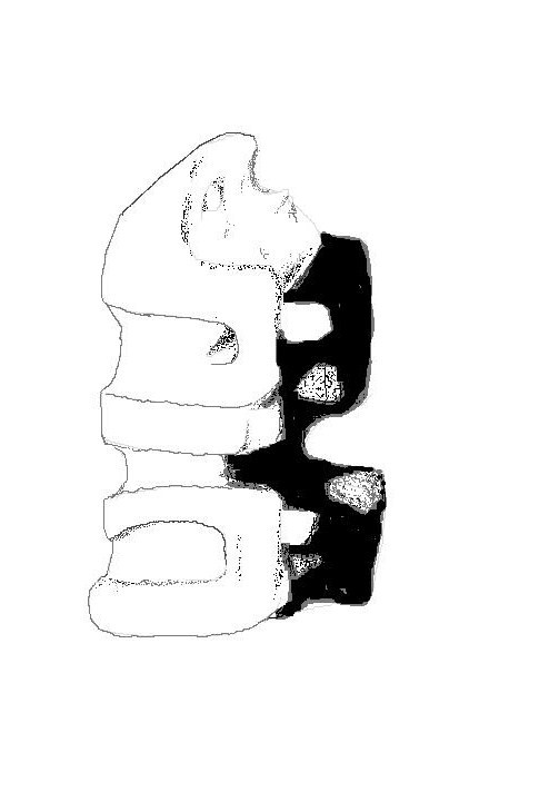 Paint